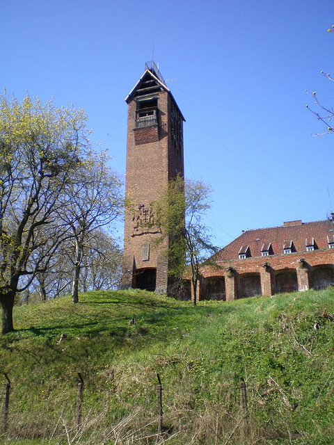 Dawne schronisko młodzieżowe na Biskupiej Górce w Gdańsku.